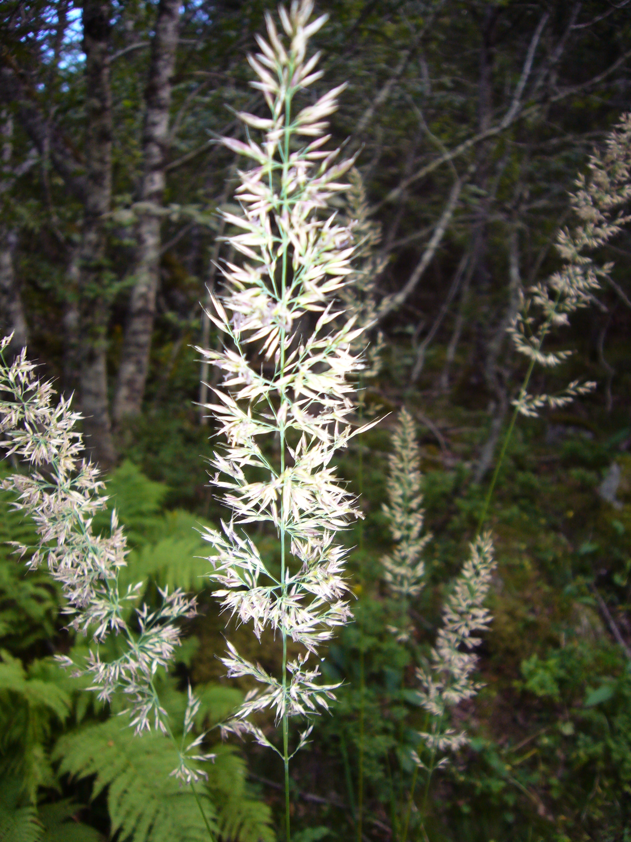 Calamagrostis arundinacea, Aubrac, Massif central, France